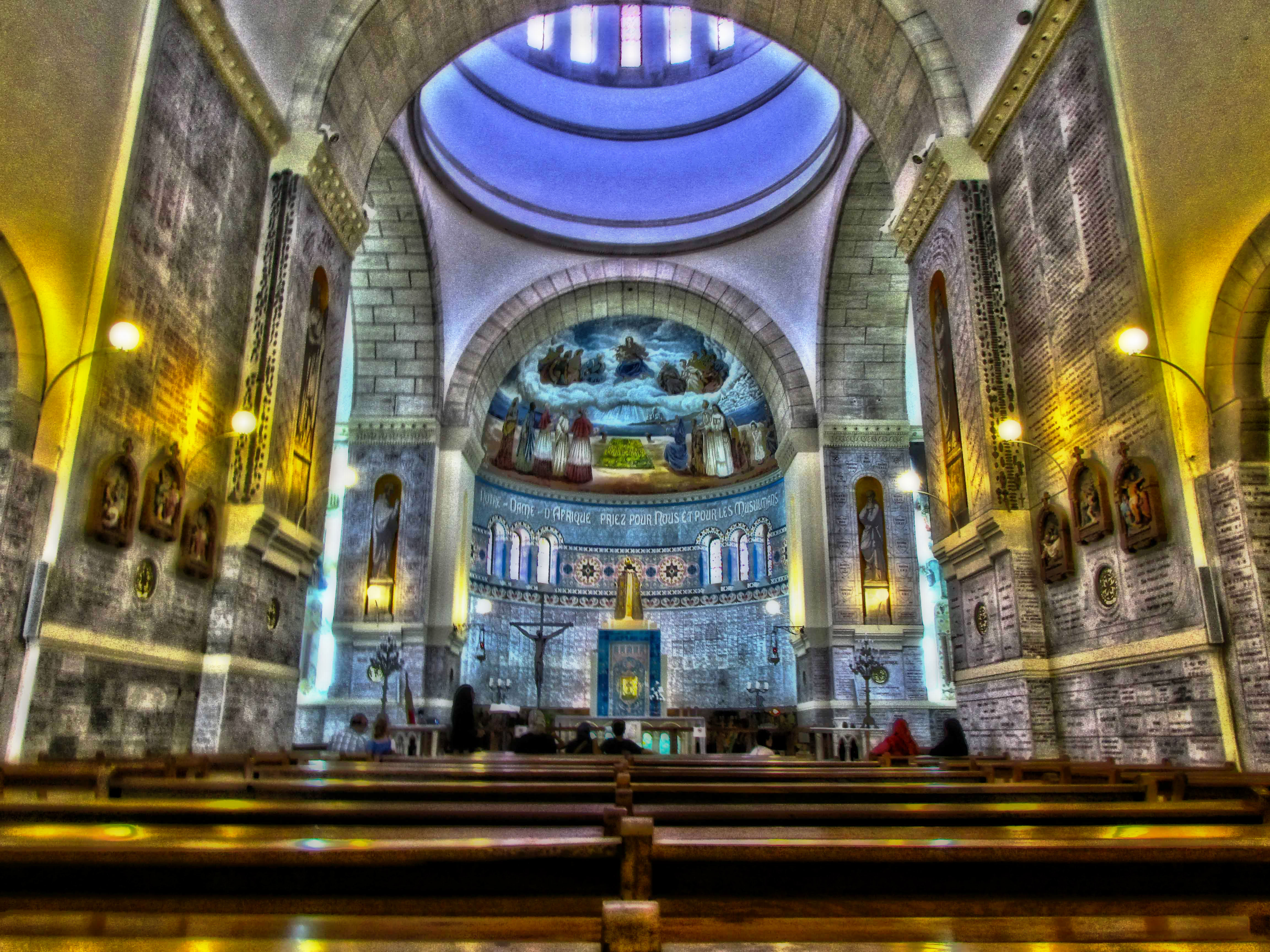 Français cadien: La basilique est construite sur un promontoire dominant la mer de 124 m, au nord d'Alger. Elle est accessible par un téléphérique qui porte son nom depuis Bologhine (ex-Saint Eugène), où se trouve le Cimetière Saint-Eugène. Elle est considérée comme « la sœur jumelle de l’église marseillaise Notre-Dame-de-la-Garde. » La basilique est surnommée « Madame l’Afrique » ou « Lalla Myriem » par les habitants du voisinage. Pour le journaliste Lyes Menacer, elle constitue un « symbole du brassage culturel et de la cohabitation religieuse depuis 160 ans